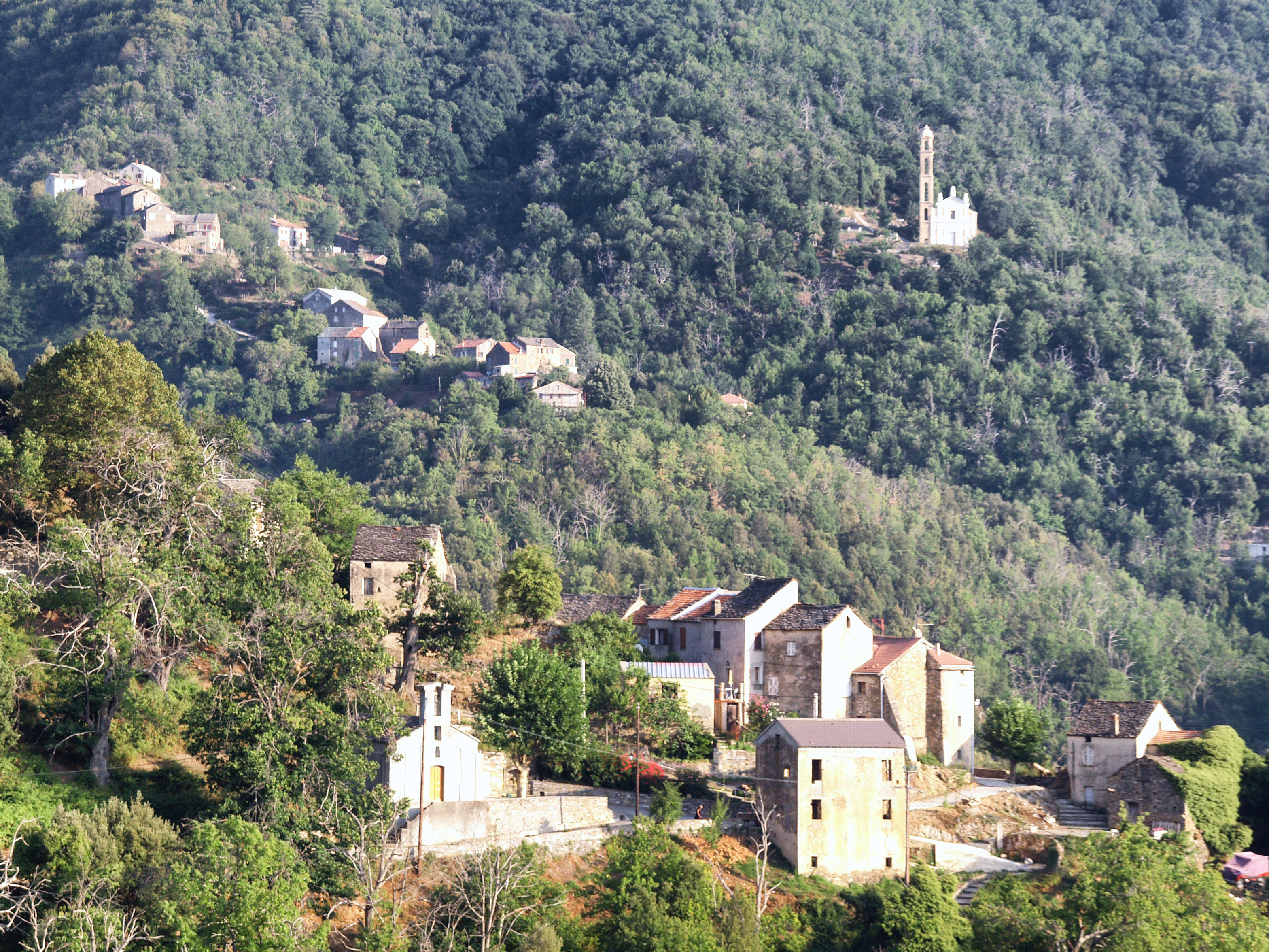 Alzi, Bozio (Haute-Corse) - Vue du village d'Alzi (avant-plan). En arrière-plan, le hameau de Poggio et l'église Sant'Andréa dite « cathédrale du Bozio ».